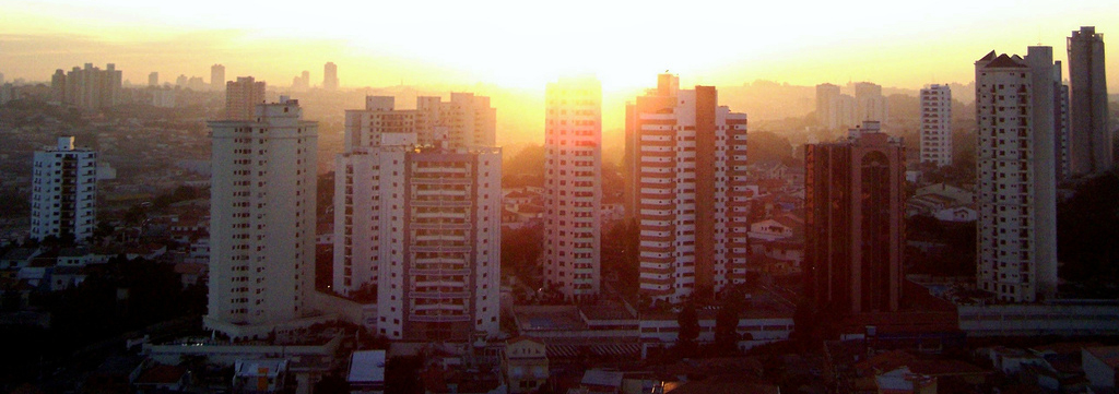 Foto vila zelina